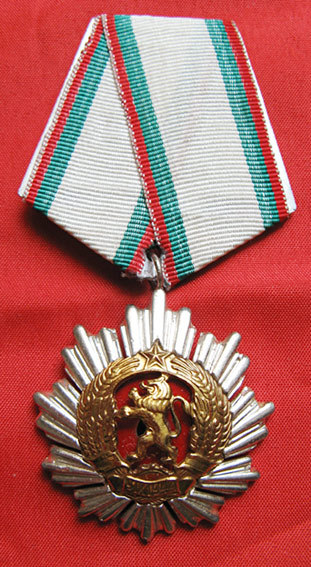 орден „Народна Република България“ III ст.